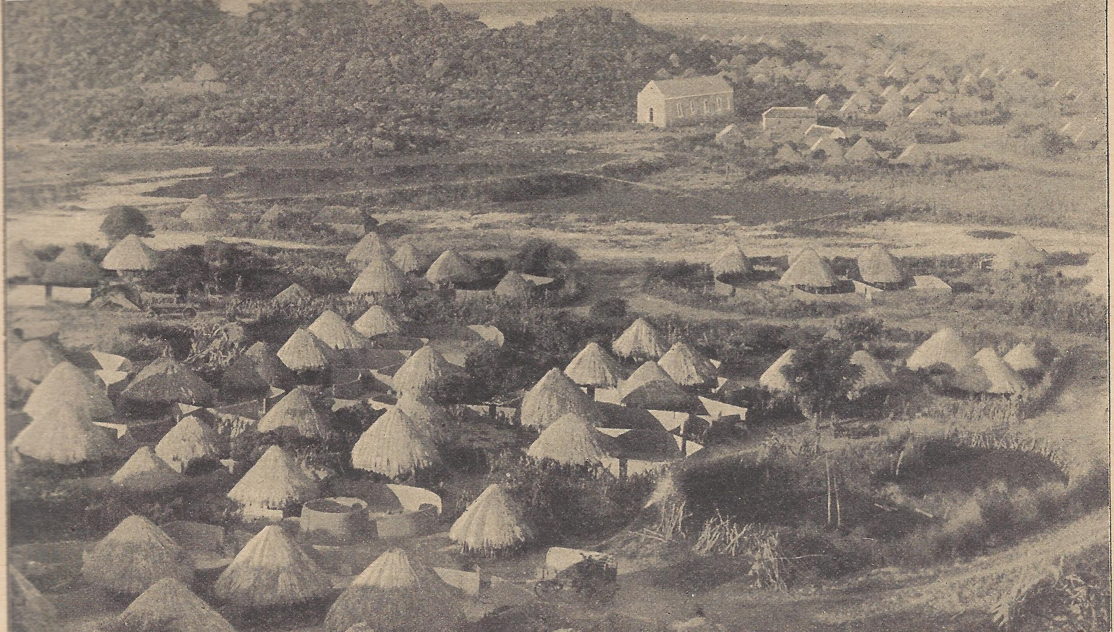 Fotografie eines Kaffernkraals.